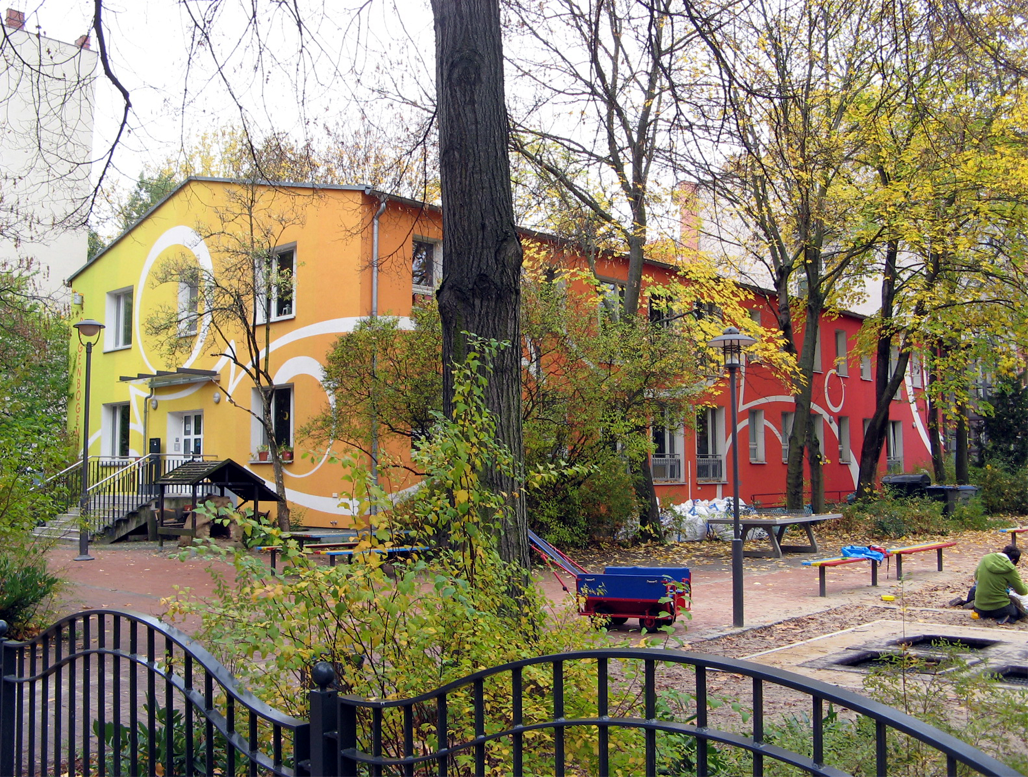 Ost- und Nordfassade des Regenbogenhauses (Kadiner Straße 9), errichtet 1959-1961. Im Rahmen der Umgestaltung 2005-2009 wurde 2006 die Fassade durch den Künstler Torsten Brill neu bemalt. Beginnend mit Rot am westlichen Ende der Nordfassade und endend mit Blau am westlichen Ende der Südfassade wurden umlaufend die Regenbogenfarben großflächig aufgetragen. Schwungvolle Bögen und Kreise darauf gliedern die Fassade und vermitteln Dynamik.